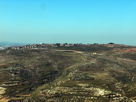 מראה היישוב he:יצהר מהיישוב השכן אליו he:הר ברכה.